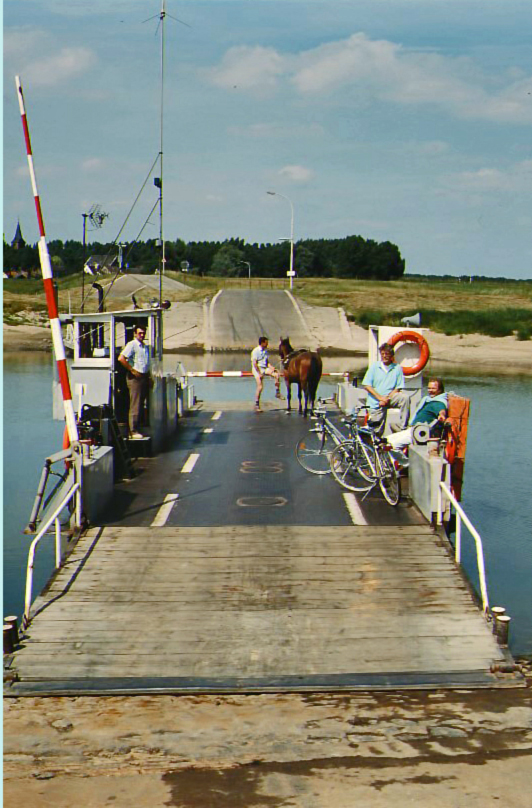 Kleve, Fähre nach Schenkenschanz (Juni 1989)